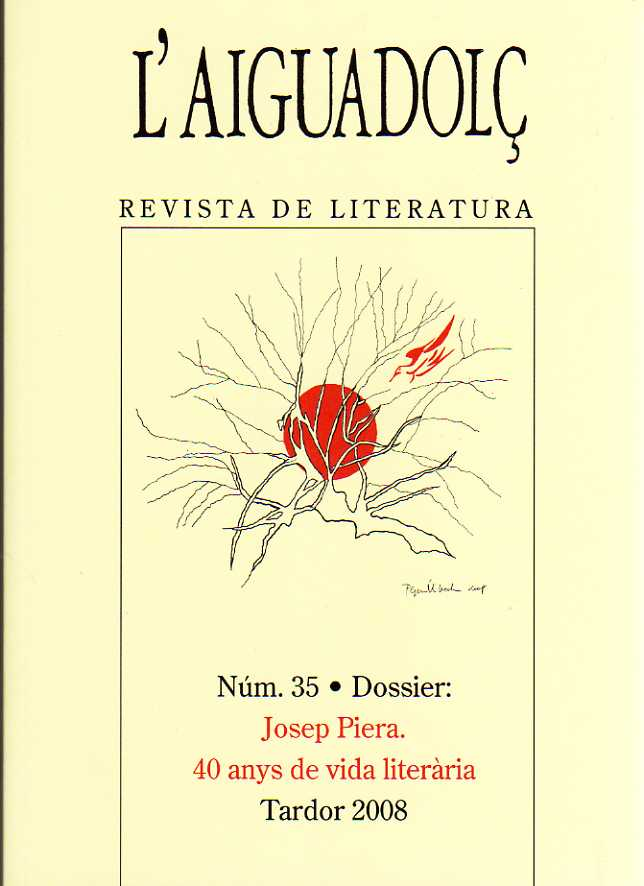 L'Aiguadolç, revista de Literatura